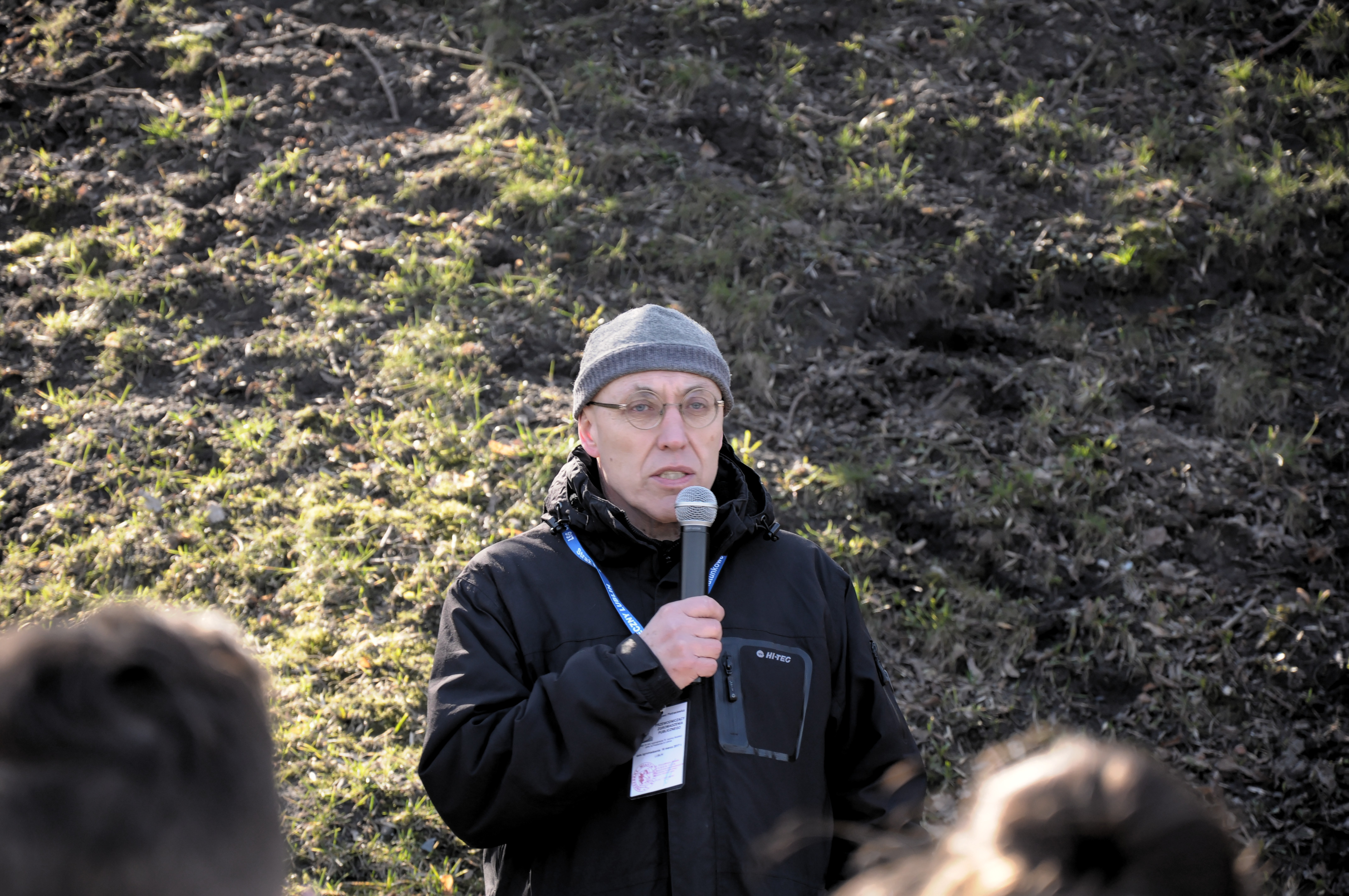 Tomasz Pietrasiewicz podczas obchodów 75. rocznicy likwidacji getta na Podzamczu w Lublinie